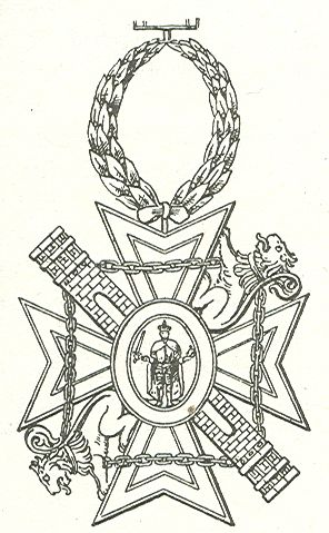 Spaanse damesorde